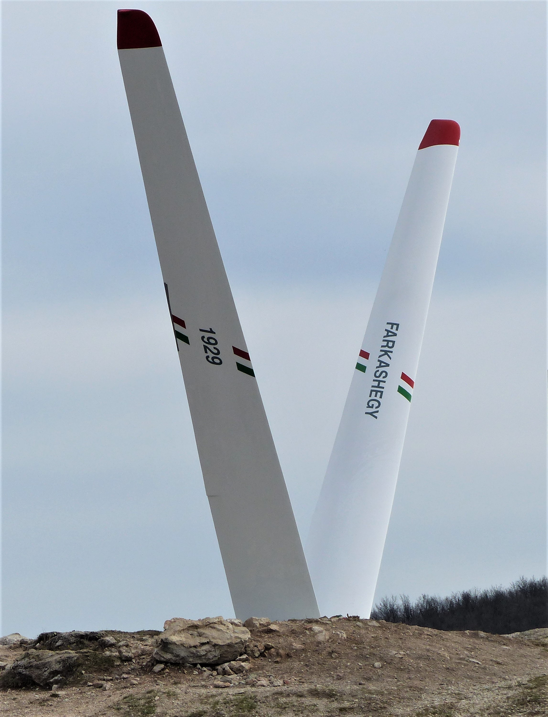 Vitorlázórepülő-emlékmű. Farkashegy, Budaörs.